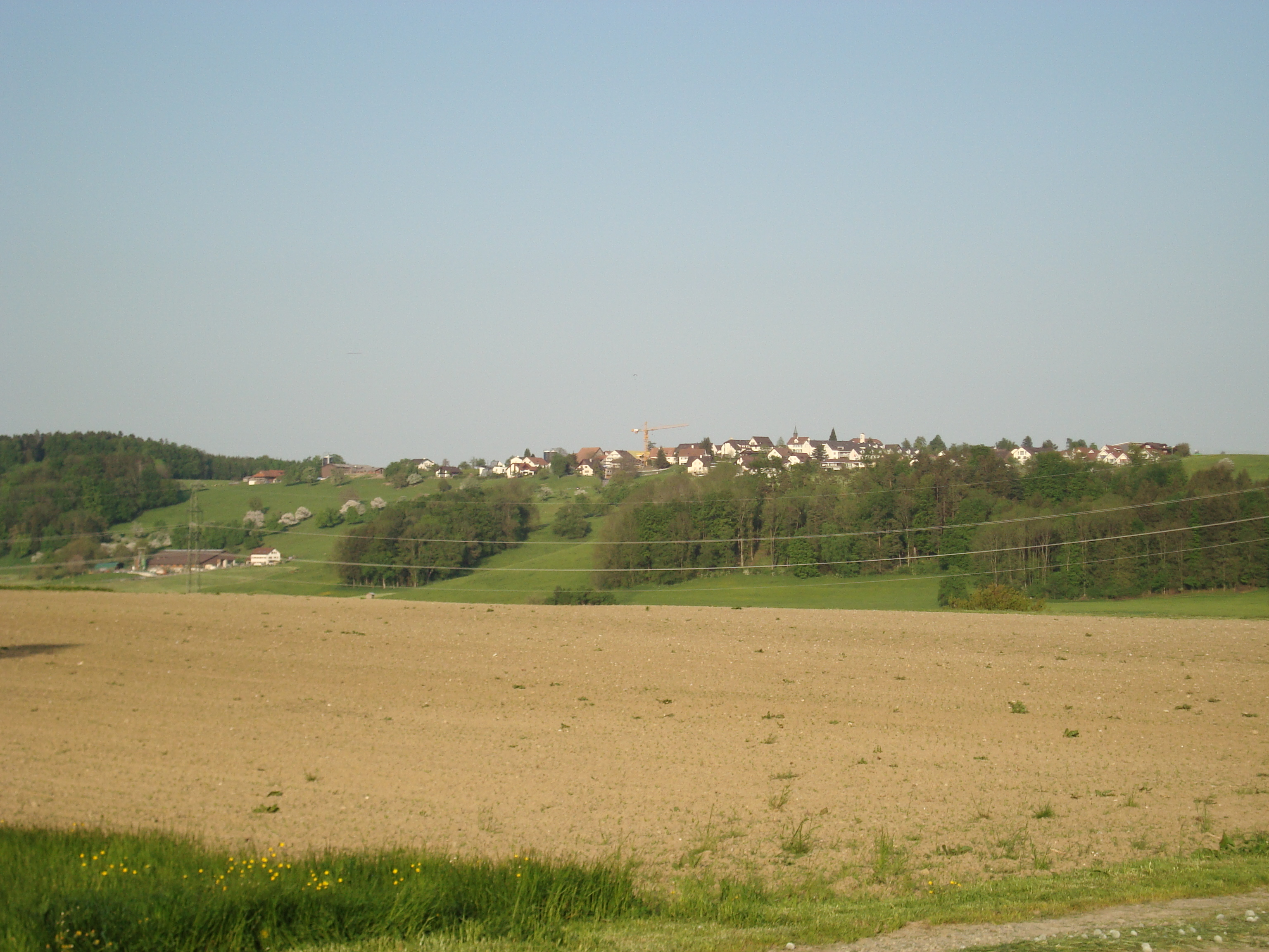 S'Dorf Islisbärg, gfötelet fom Wiibrguet (Gde Arni AG) us